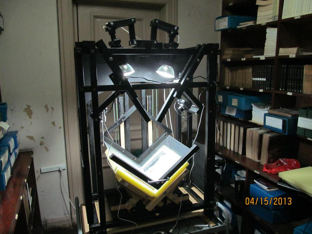 escaner-cnba